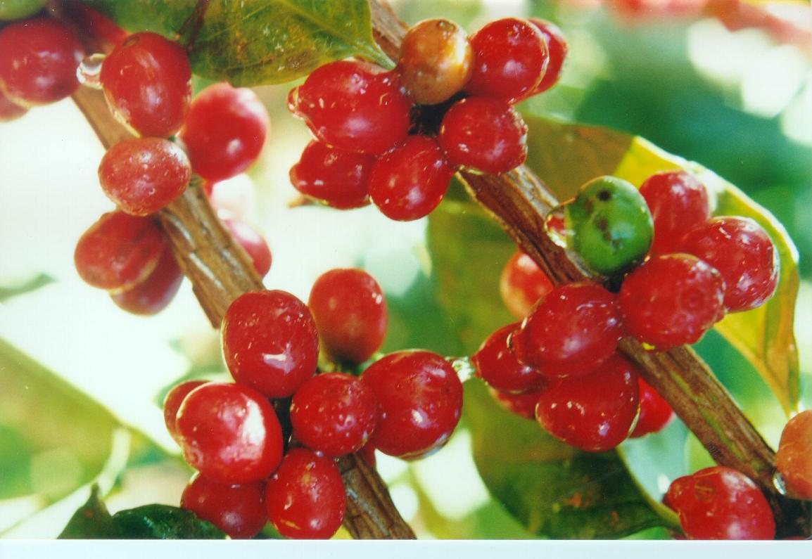 Café frutificado no Paraná